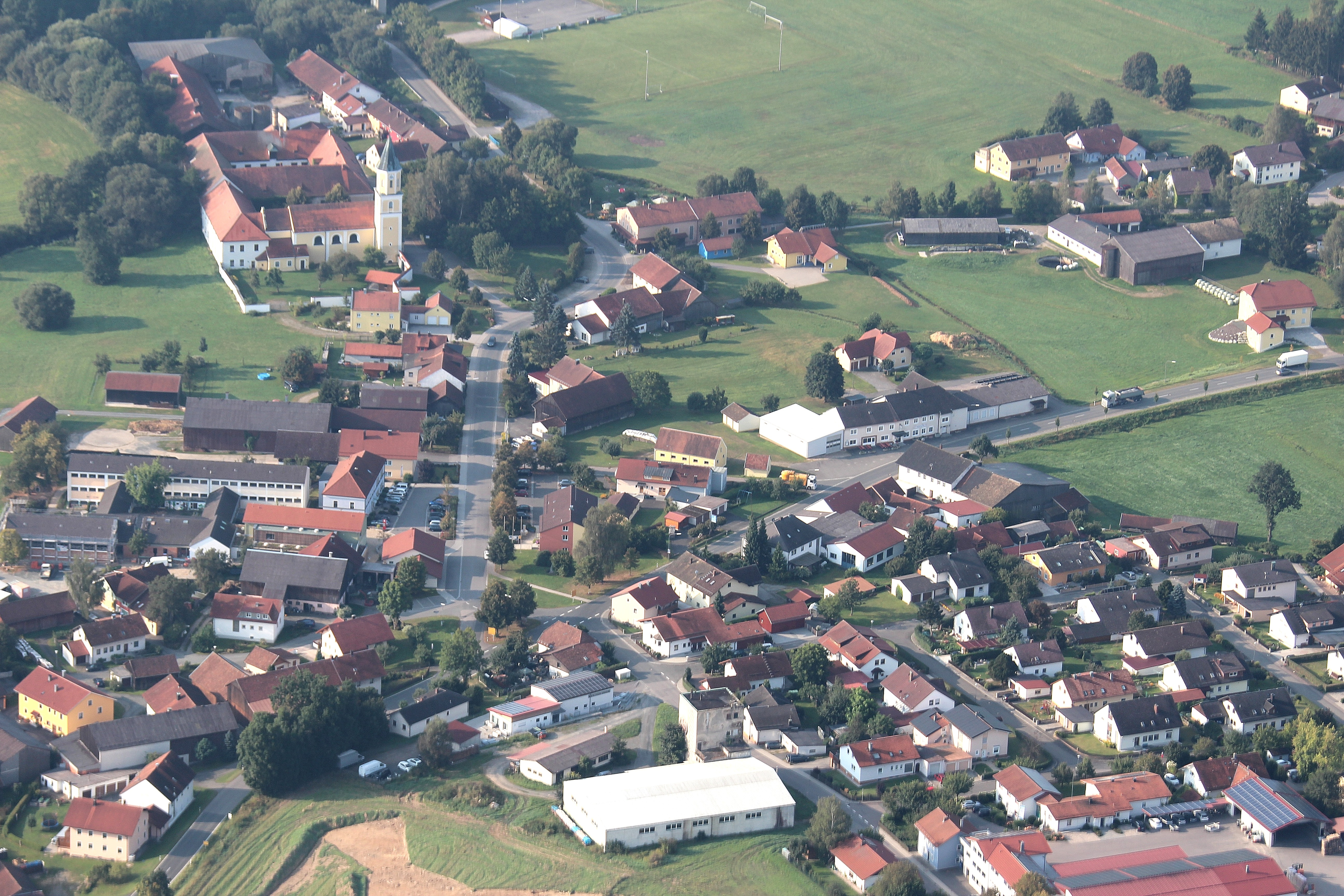 Schönthal, Brauhausstraße, Pfarrer-Würth-Straße, Am Pfarrfeld, Hauptstraße, Rathausplatz, Alte Chamer Straße, Pfarrkirche St. Michael; Landkreis Cham, Oberpfalz, Bayern